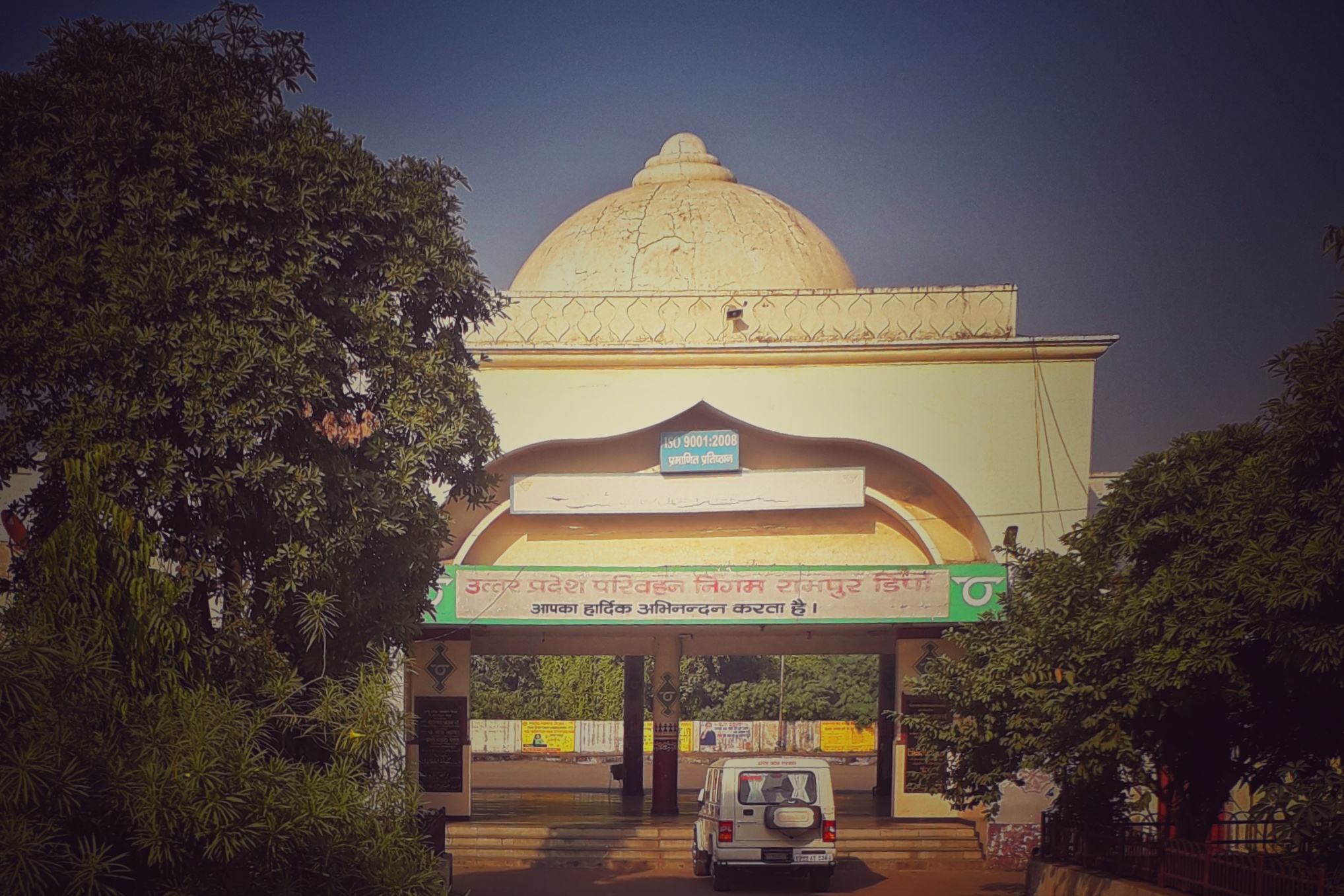 UPSRTC Depot at Rampur, Uttar Pradesh